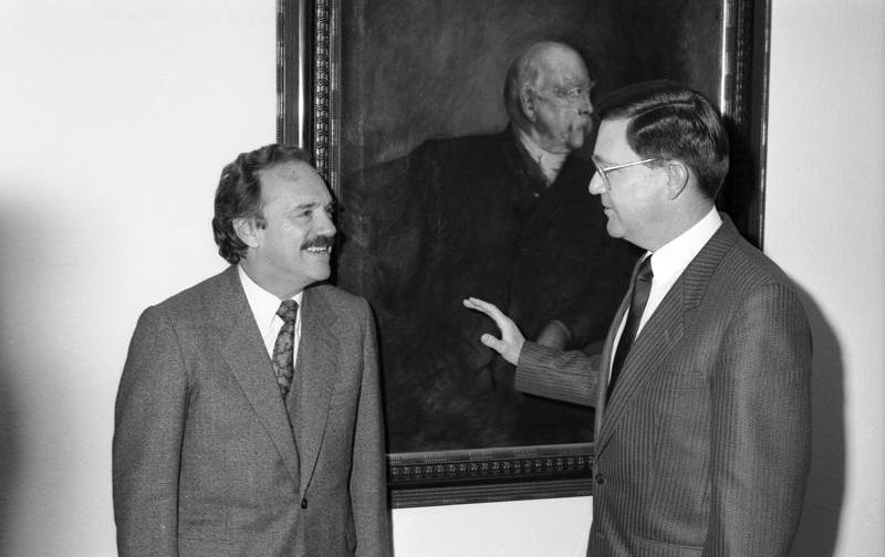 Der Parlamentarische Staatssekretär beim Bundesminister des Innern, Carl-Dieter Spranger, empfing am 18. Januar 1989 den Innenminister von Uruguay, Dr. Antonio Marhesano, zu einem Informationsgespräch über polizeiliche Organisation im Bundesministerium des Innern. Information added by Wikimedia users.